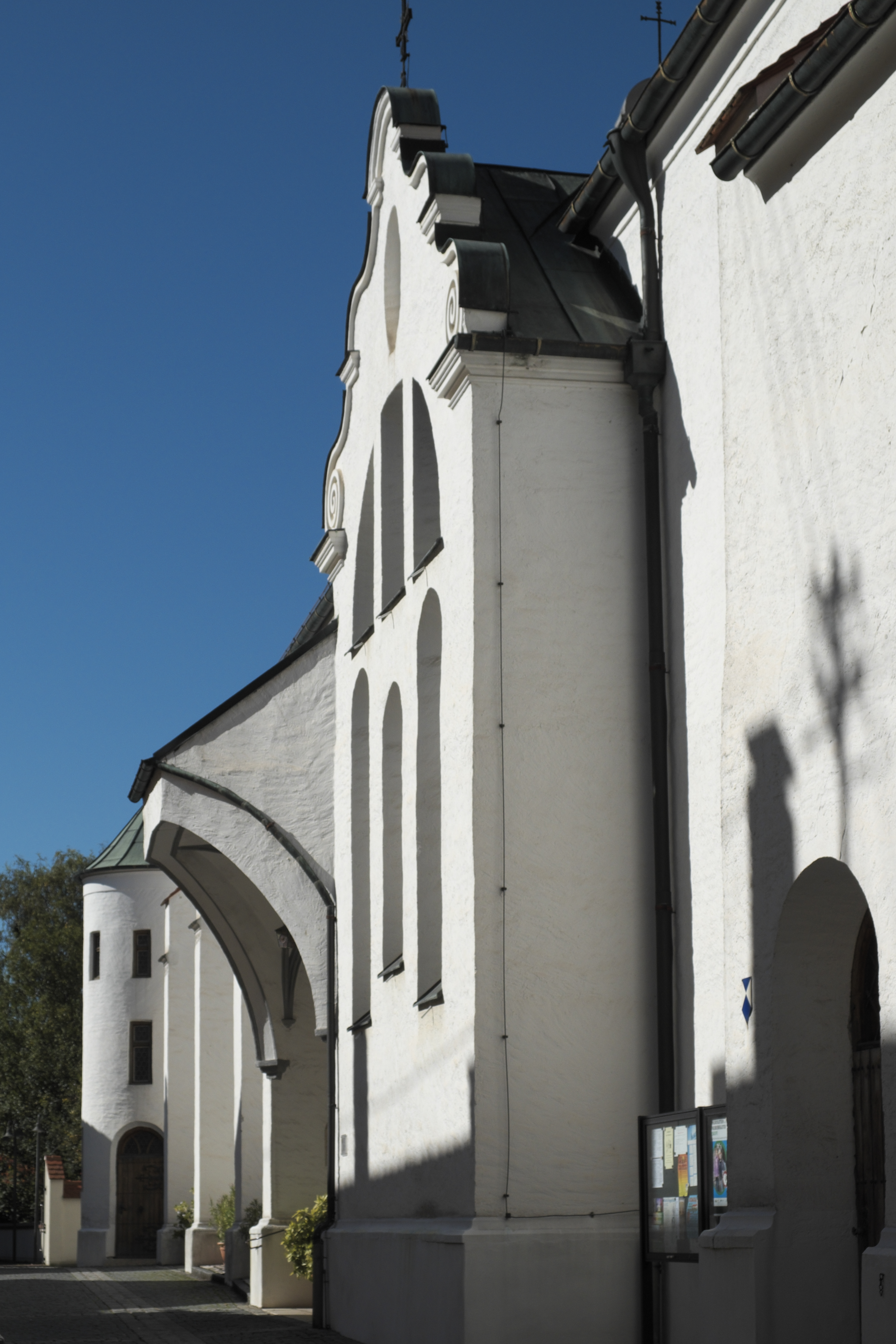 Katholische Stadtpfarrkirche Mariä Himmelfahrt in Höchstädt im Landkreis Dillingen an der Donau (Bayern), Südfassade